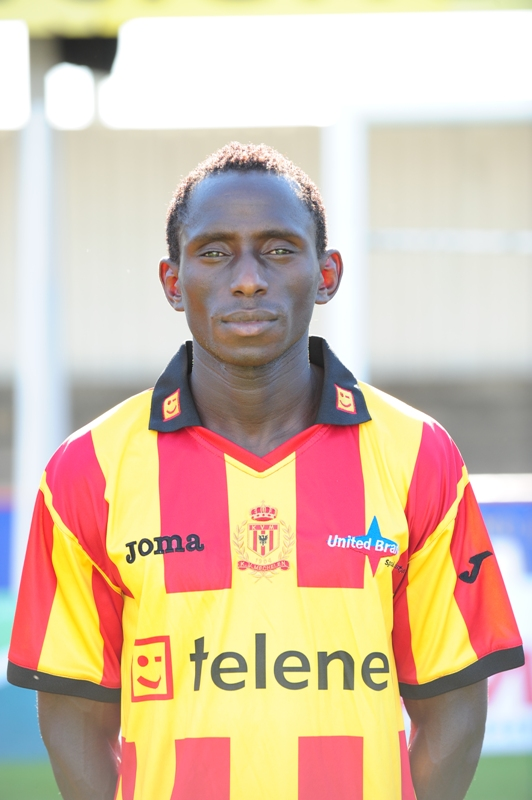 Boubacar Diabang Dialiba